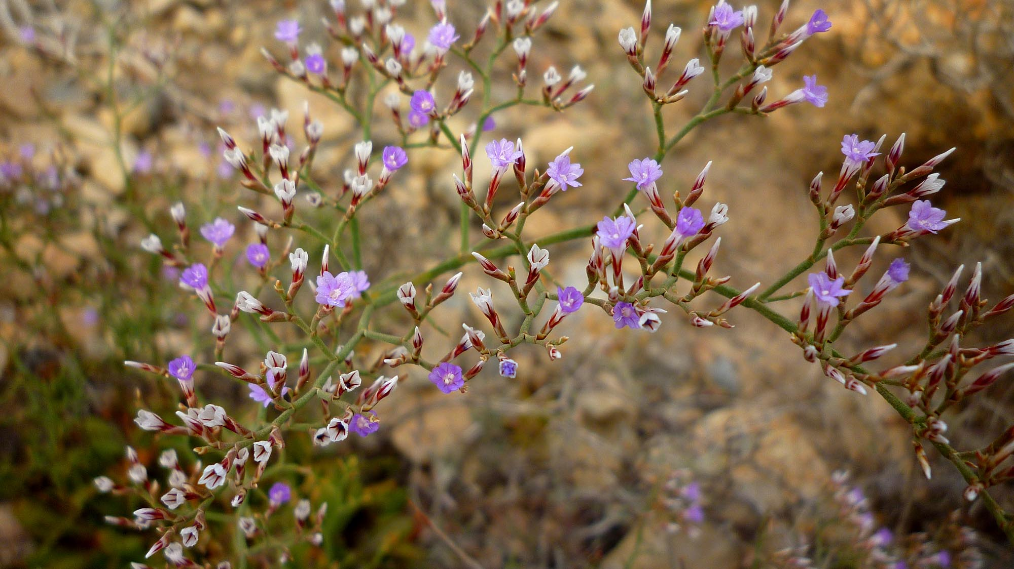 Limonium carthaginense. Endemismo de las sierras de Cartagena.